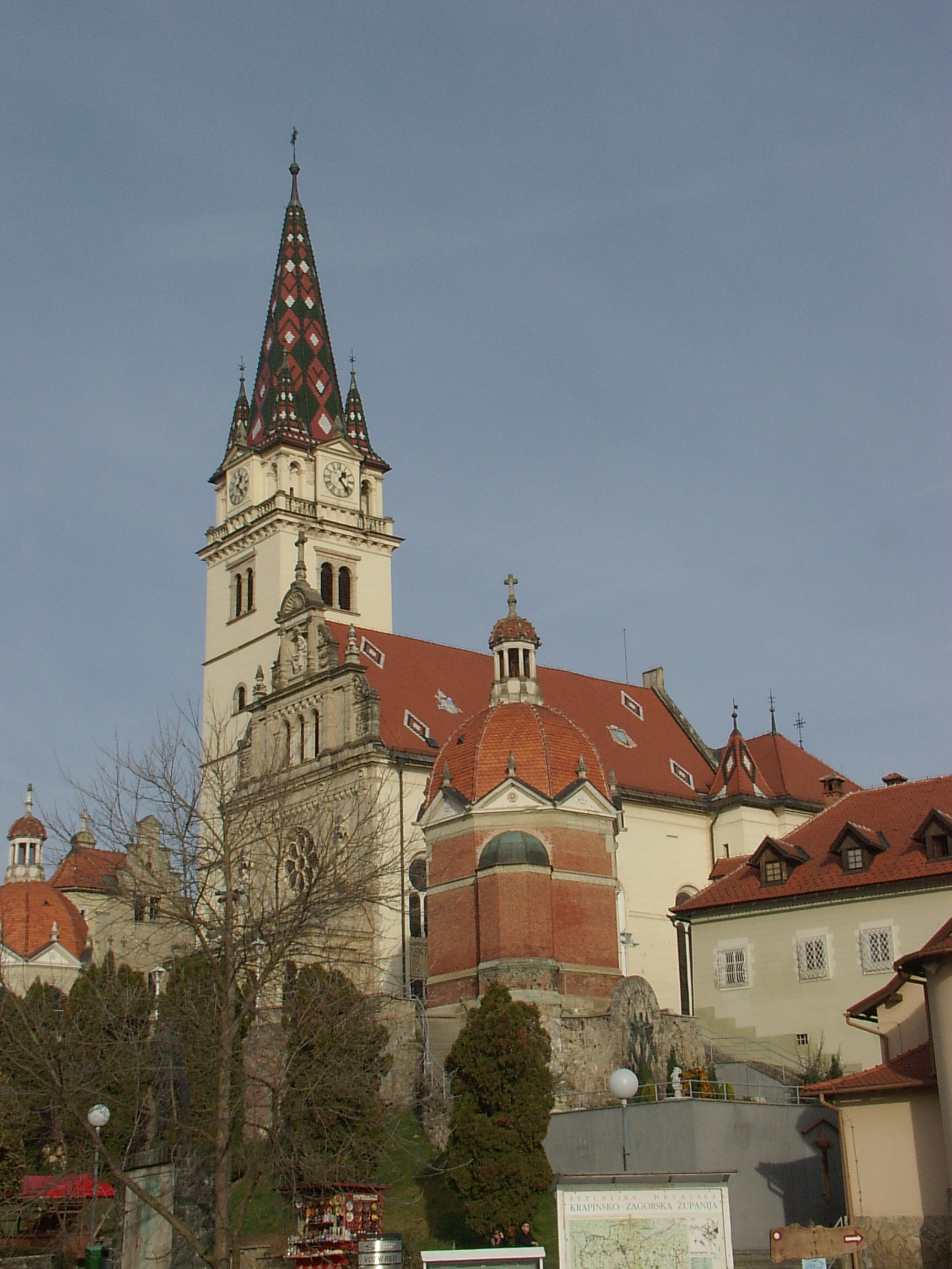 Basilica in Marija Bistrica